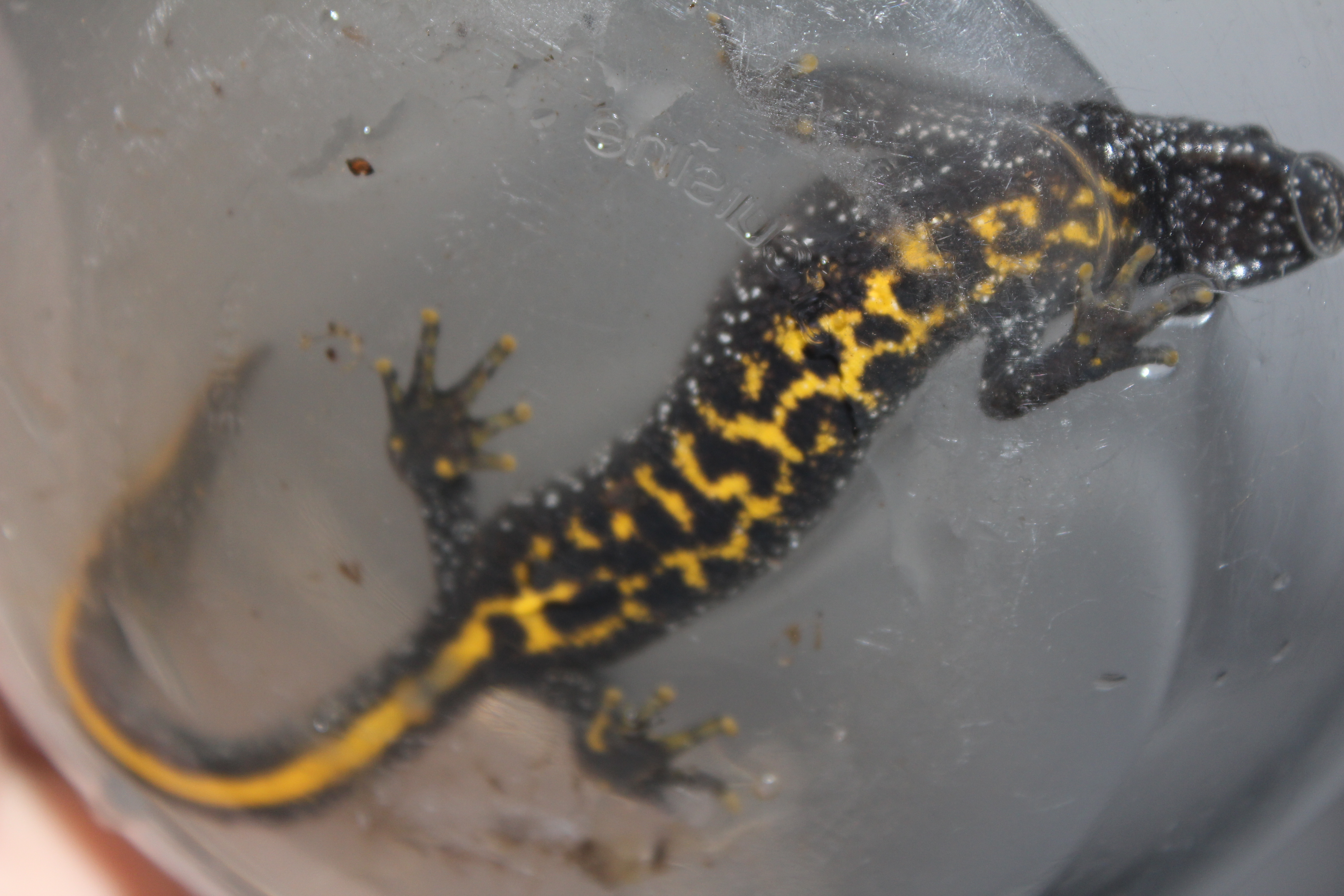 Salamander